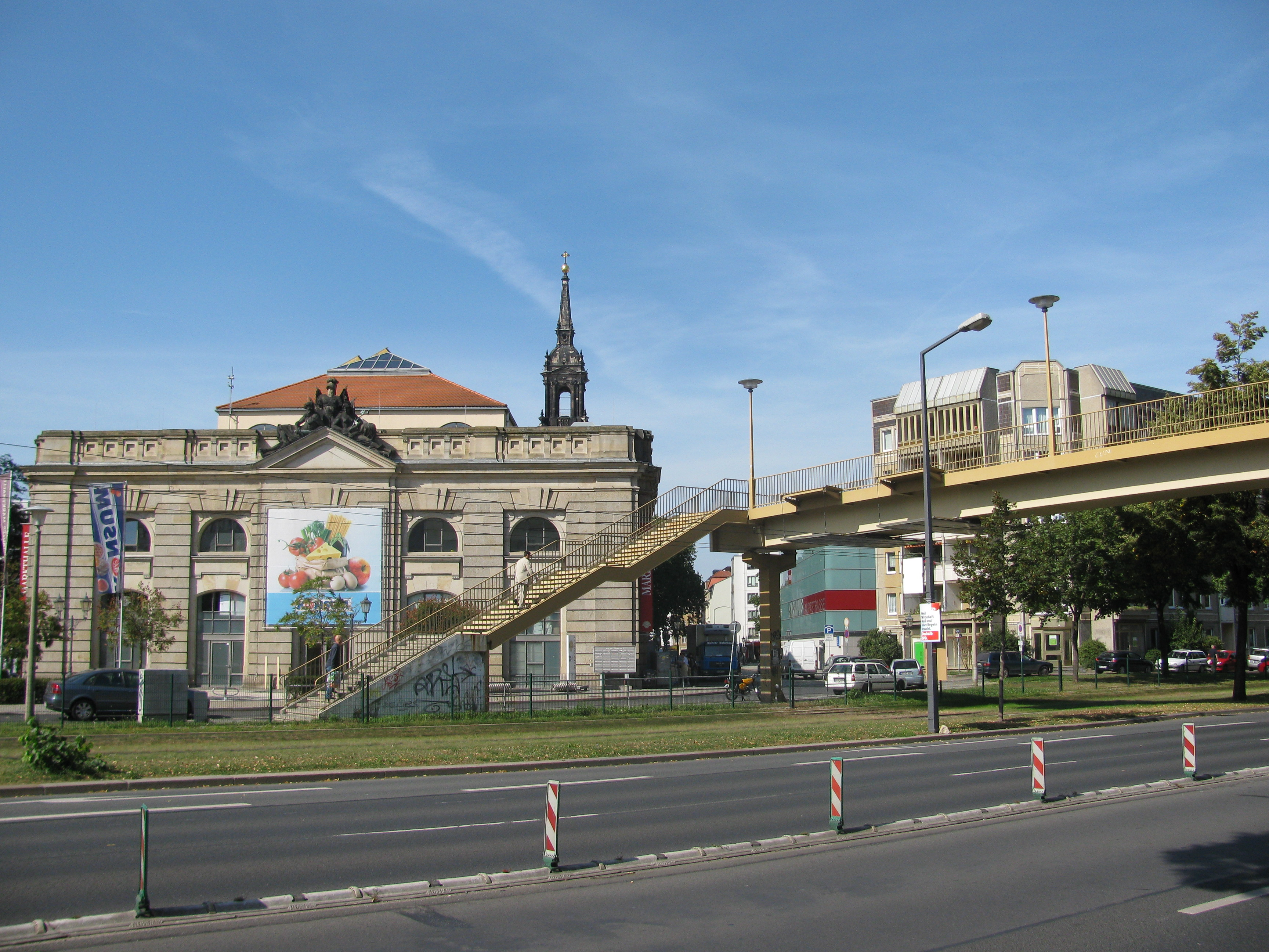 Albertstraße, Dresden, Stadtteil Innere Neustadt. Blick vom Staatsarchiv über die Straße zur Fußgängerbrücke und zur Neustädter Markthalle. Darüber die Turmspitze der Dreikönigskirche. Ganz rechts sechsgeschossige Wohnbebauung entlang der Albertstraße, links daneben (unter der Brücke) das automatische Parkhaus an der Metzer Straße.